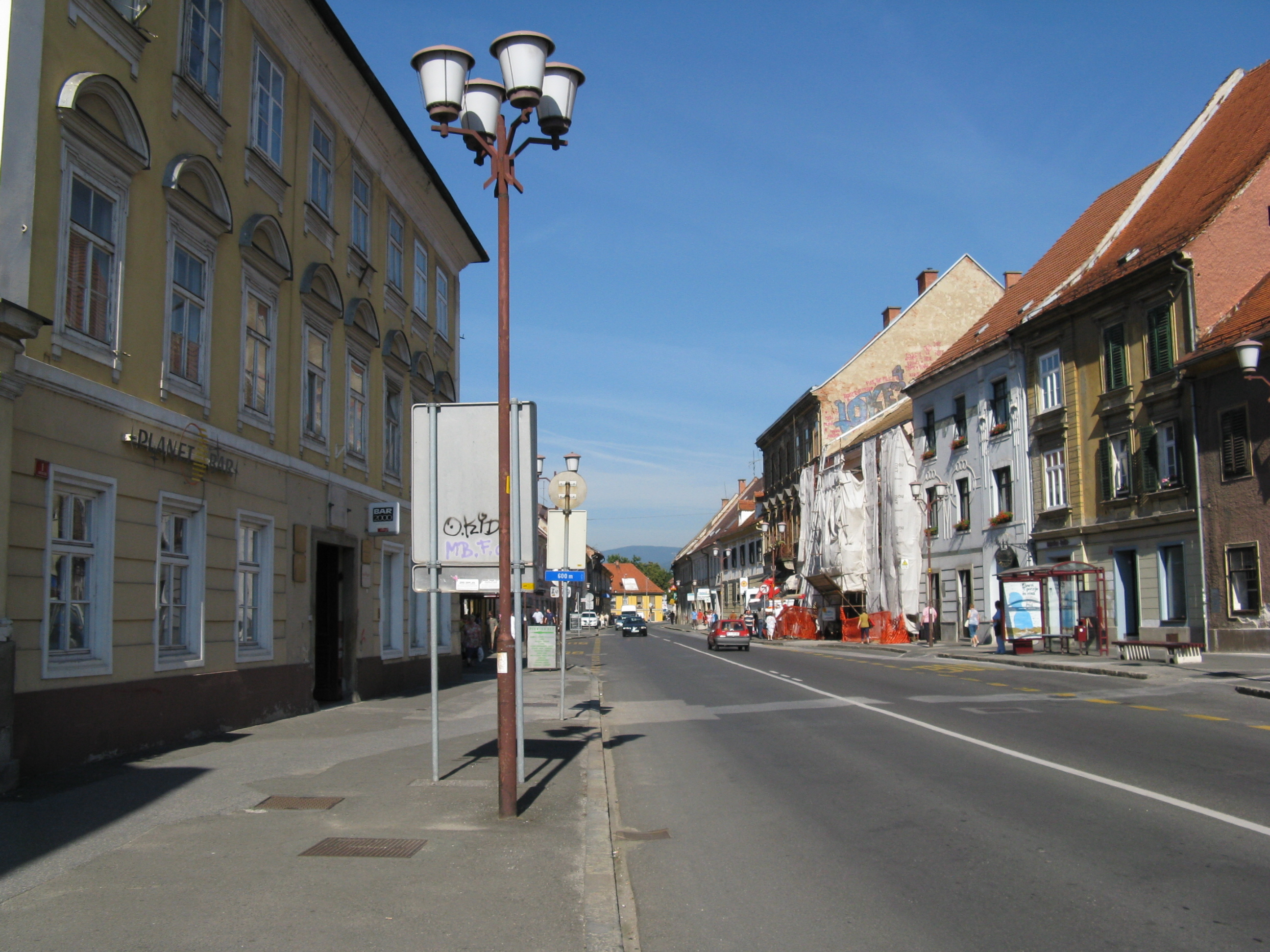 Old part of Koroška cesta